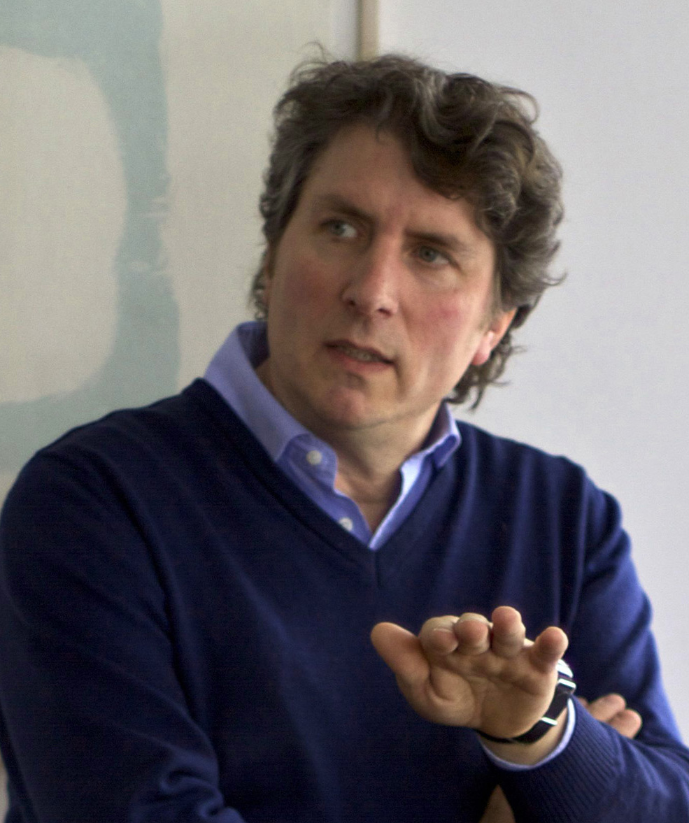 Portrait Oliver Conrad